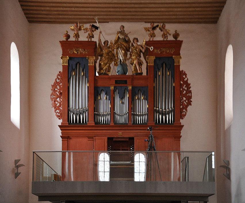 Ingelheim am Rhein, Saalkirche, Orgel von Bernhard Dreymann (Mainz), 1853